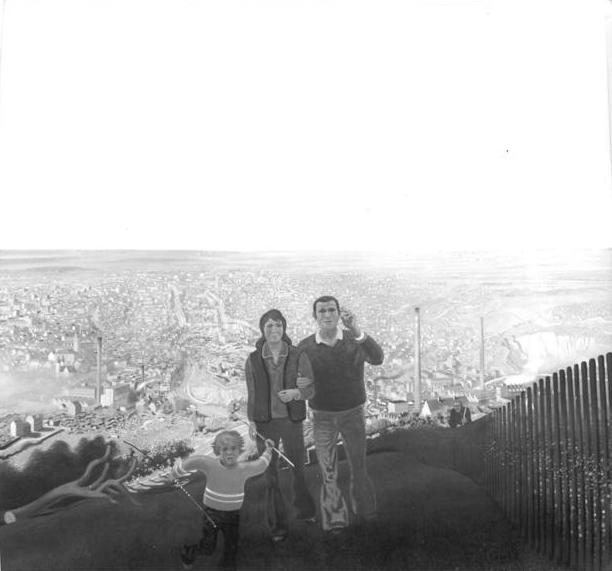 ADN-ZB Repro-10.5.76 Berlin Gemälde im Palast der Republik- Zahlreiche bildenden Künstler haben unseren Palast der Republik durch eine Fülle von Kunstwerken bereichert. Bei Wolfgang Mattheuer wird eine ganz einfache Szene zum bedeutenden Gleichnis gestaltet. Der Spaziergang einer Familie führt steil und darum nicht mühelos zur Höhe empor. Das Grün der Landschaft bildet einen Kontrast zur großen Stadt im Tal. Der Maler sieht die Stadt mit aufmerksamer Heimatliebe. Die breitet sich hell im weiten Land aus, ist ein wesentliches Stück unserer historisch gewachsenen Daseinssphäre.